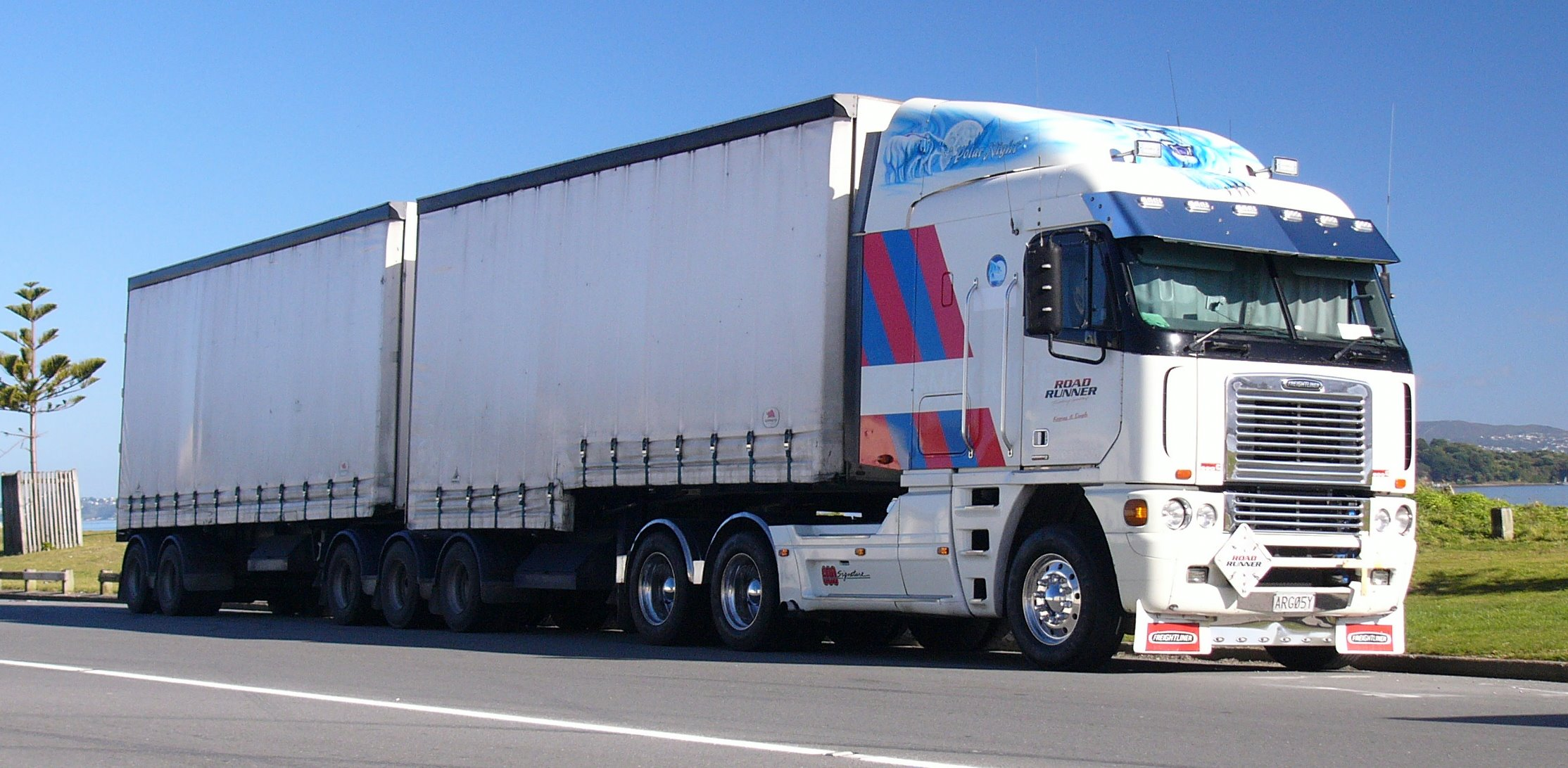 2000 Freightliner Argosy